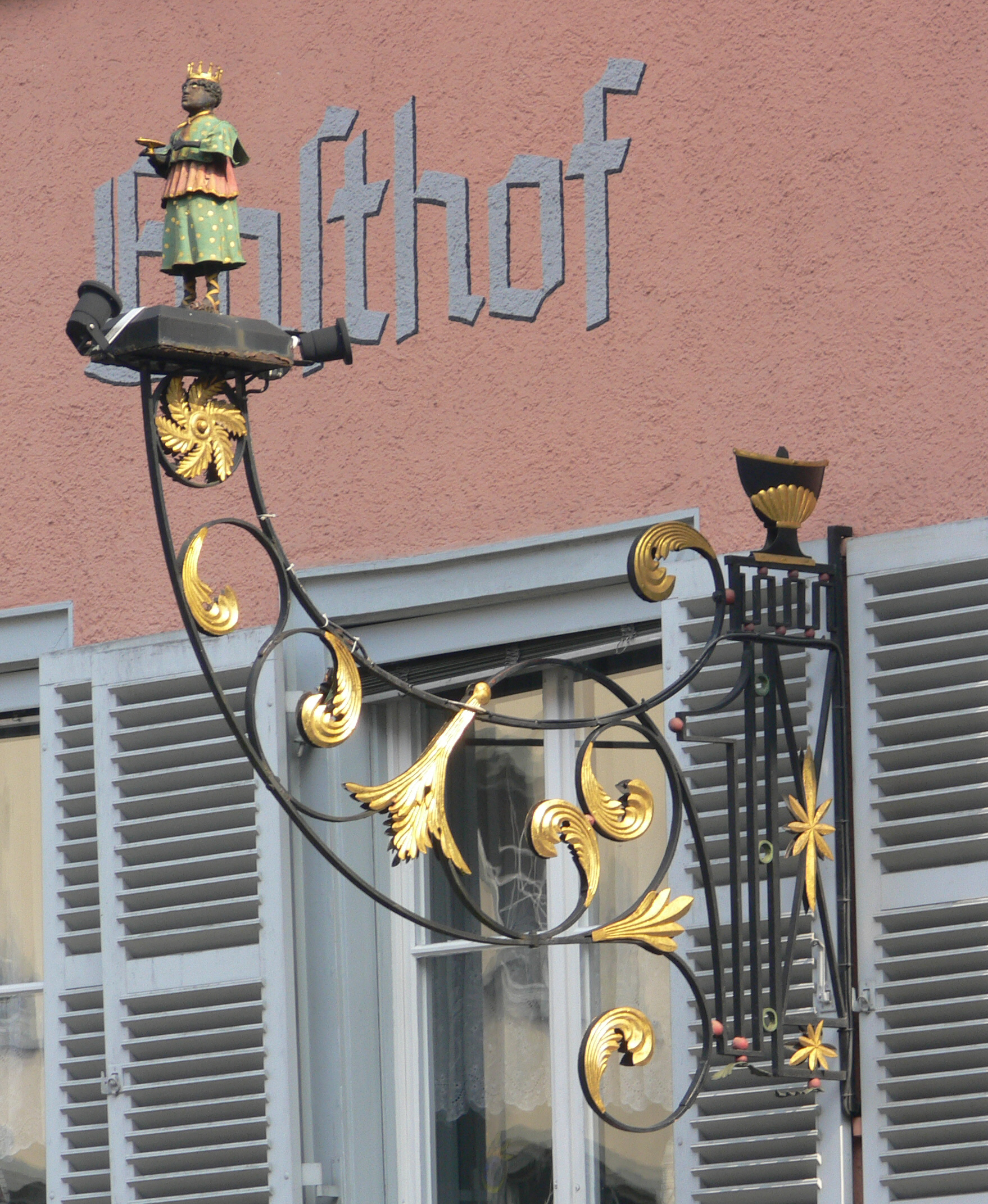 Ravensburg, Marktstraße, Gasthof Mohren, Wirtshausschild